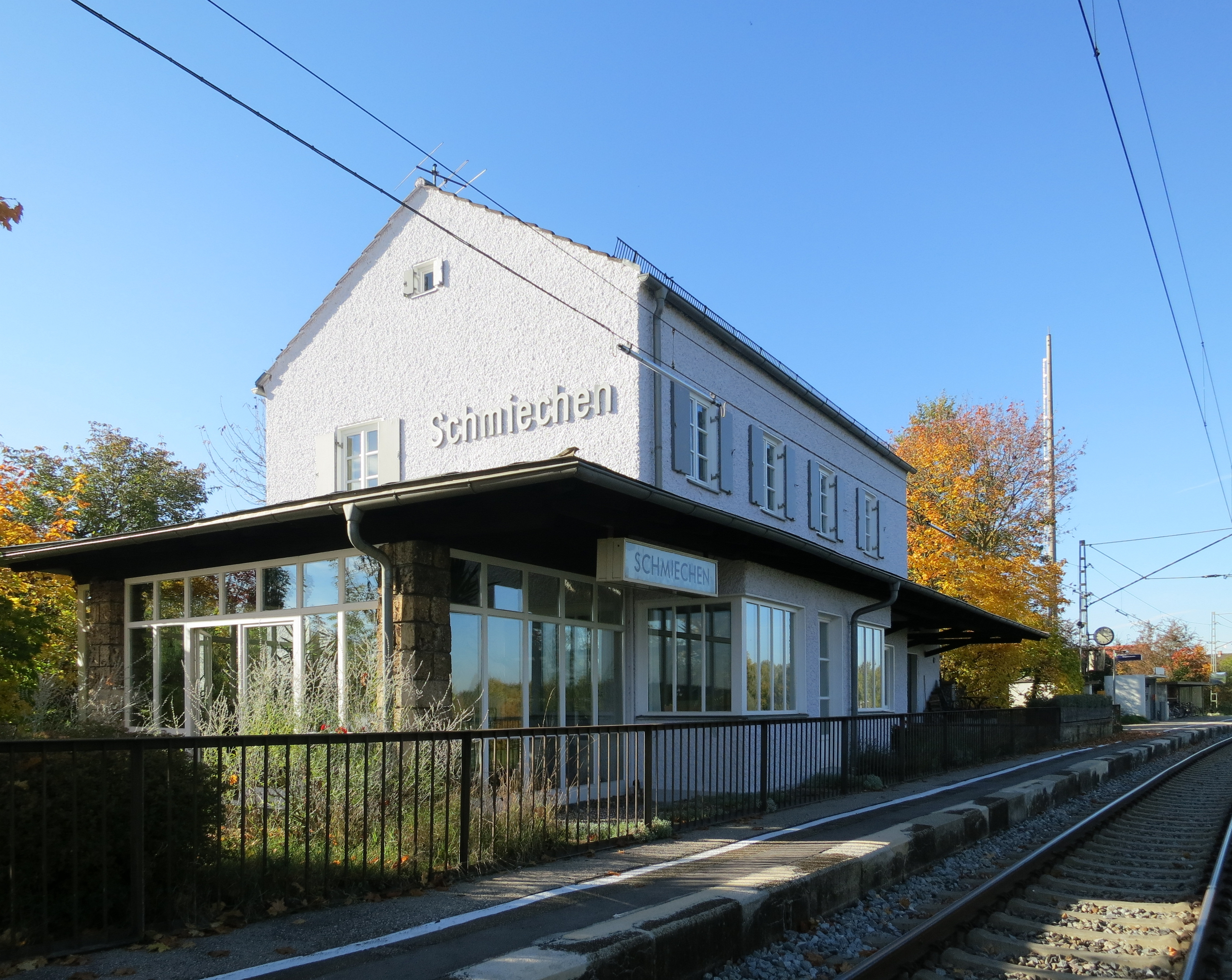 Empfangsgebäude des Bahnhofs Schmiechen (Schwab) an der Ammerseebahn von der Gleisseite